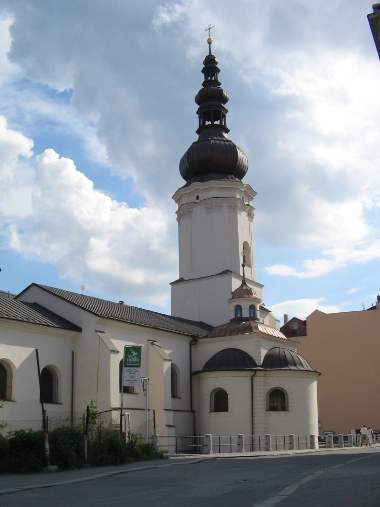 Kostel Svateho Vaclava v Ostrave